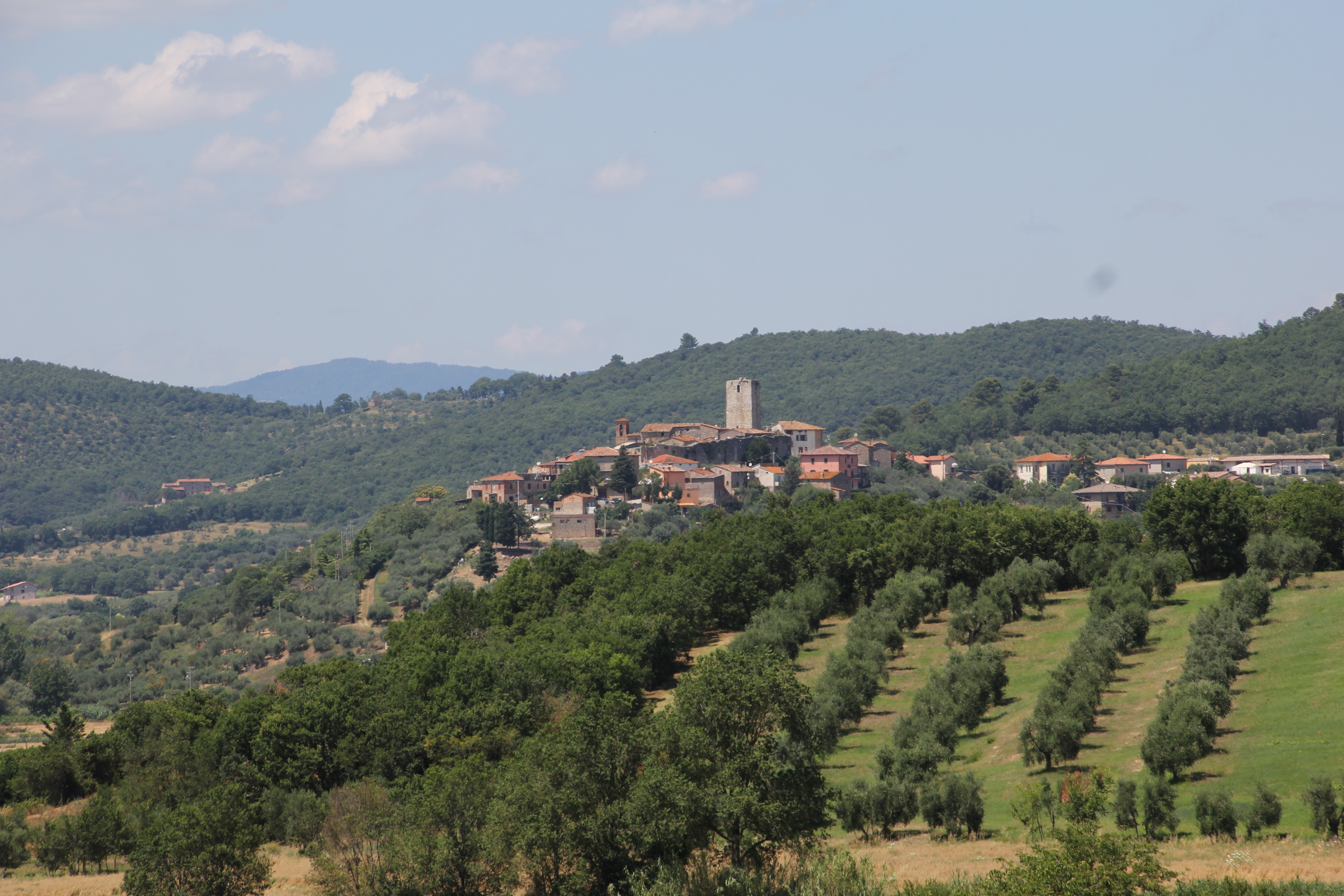 Magione, frazione San Savino, panorama